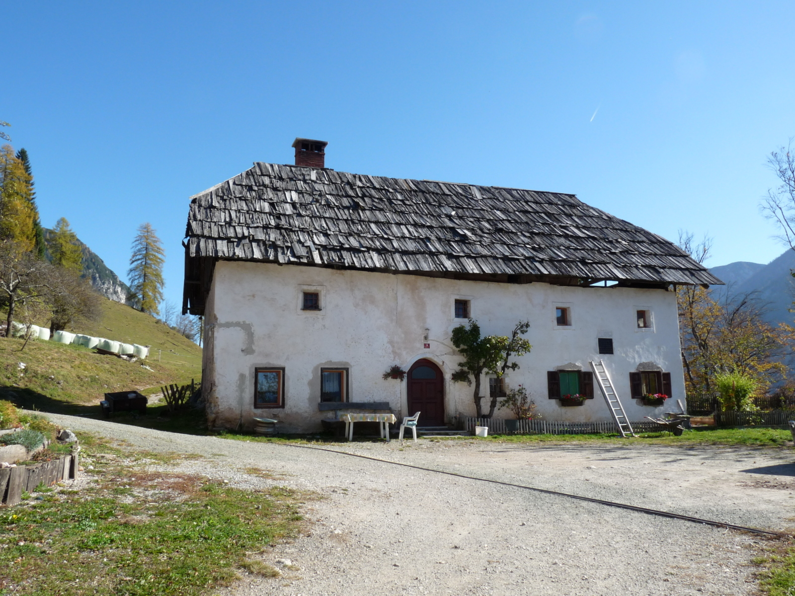 Kmetija Vavčar na Srednjem Vrhu s spominsko ploščo Lovrencu Lavtižarju, ki se je tu rodil